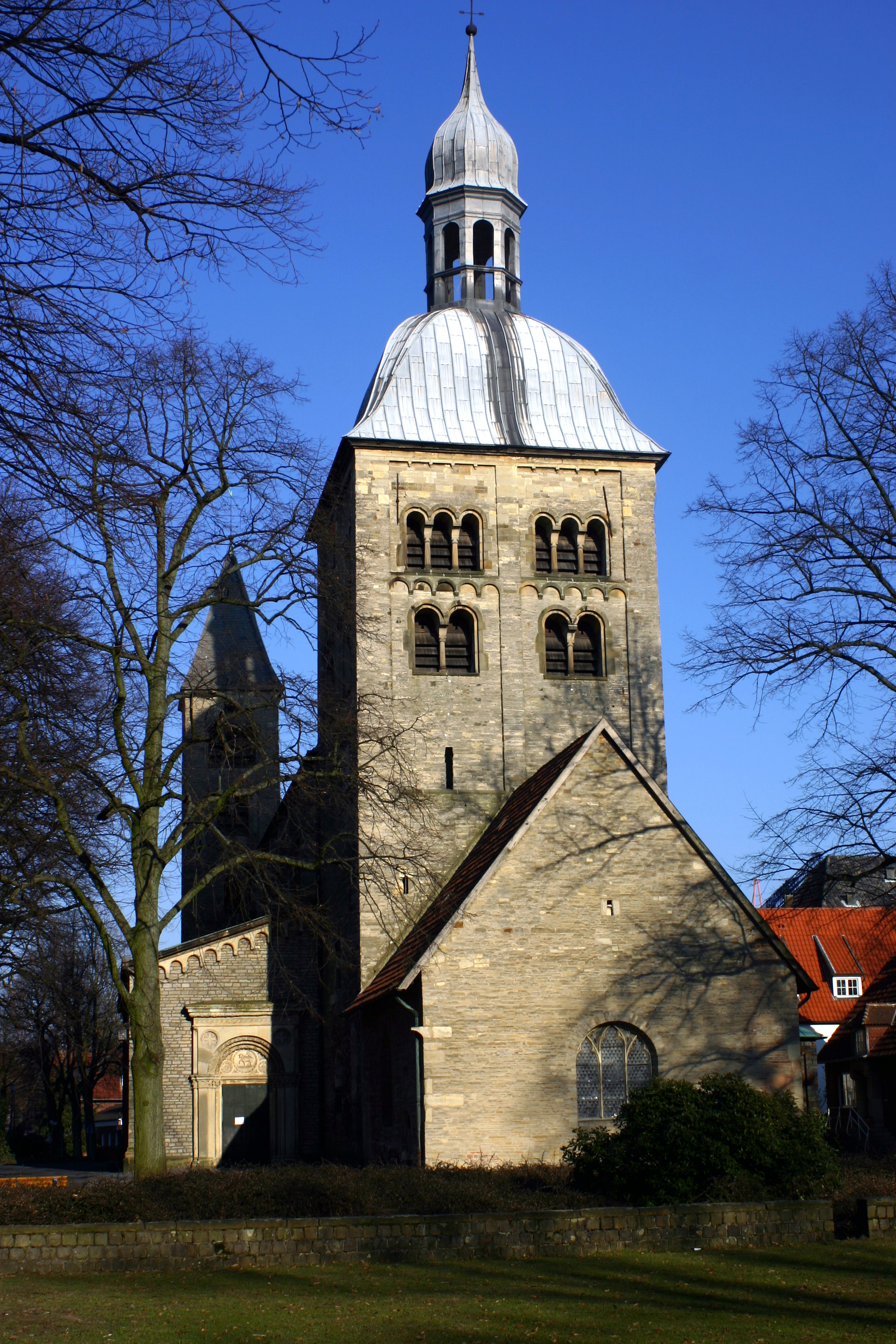 die St. Mauritz Kirche vom Hohenzollernring aus gesehen